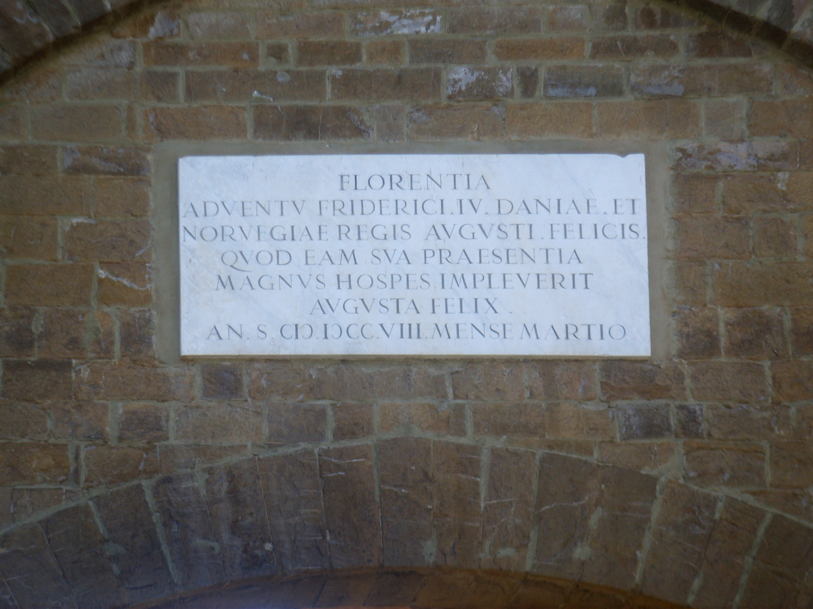 Lapide su Porta San Gallo in ricordo del passaggio in Firenze nel marzo 1708 del re Federico IV di Danimarca